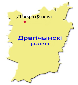 Беларуская (тарашкевіца): Дзераўная, Драгічынскі раён